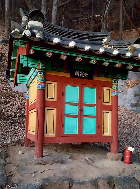 영주시 부석사 단하각